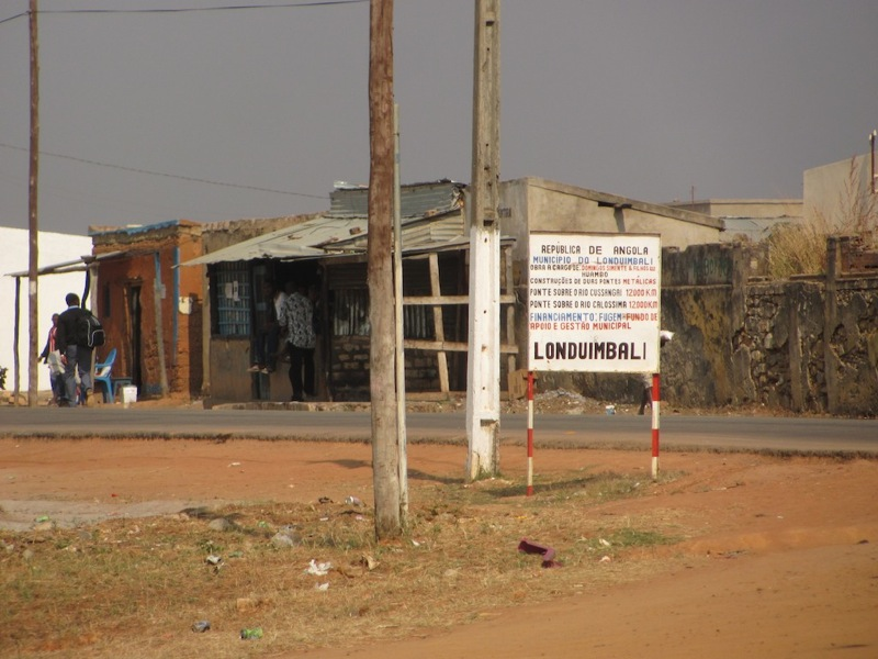 Sign in Londuimbali, Huambo Province, Angola